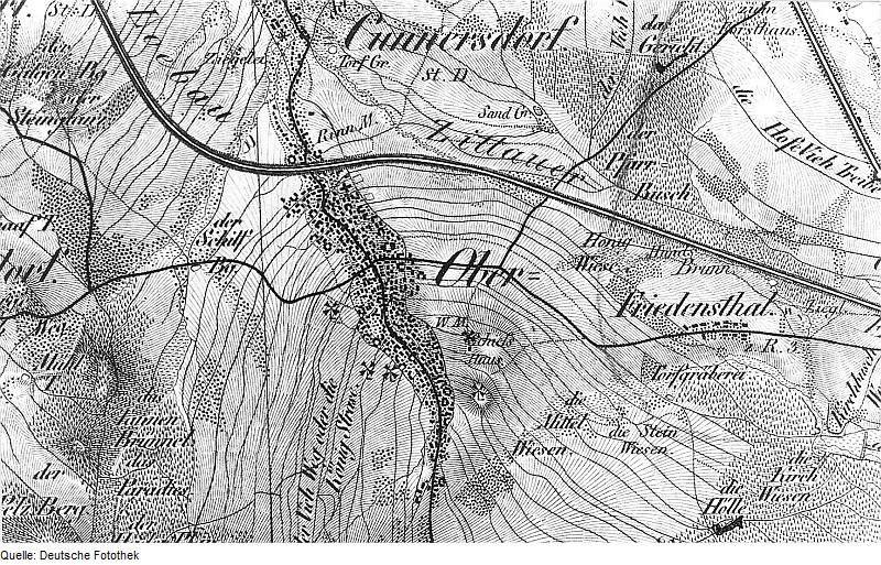 Original image description from the Deutsche Fotothek Obercunnersdorf. Oberreit, Sect. Zittau, 1844/46